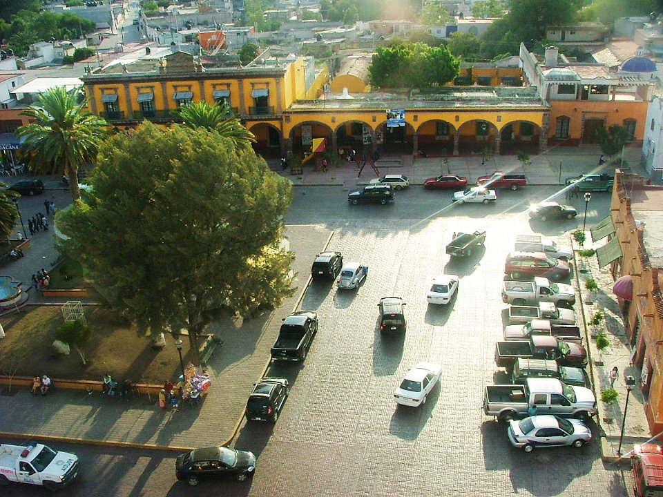 Municipio Zimapán